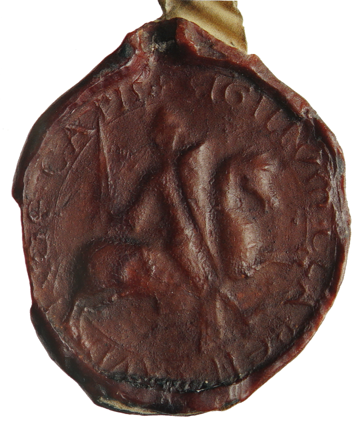 cf. titre de l'image